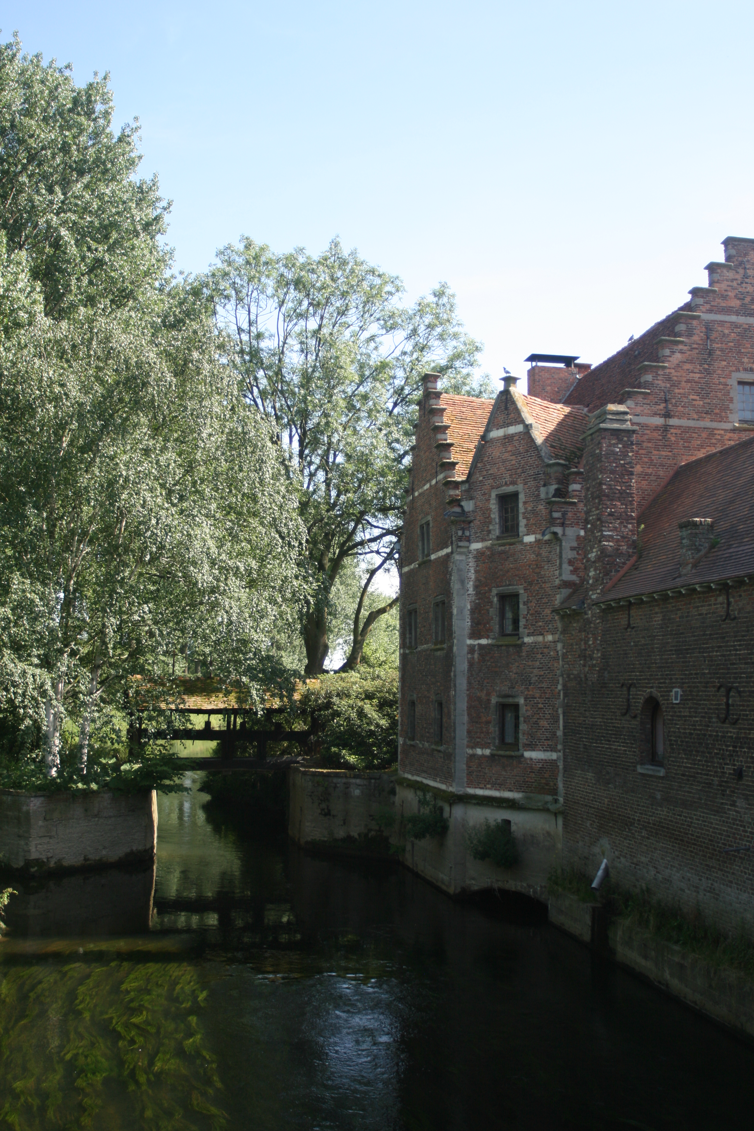 Watermolen op de Gete in Halen